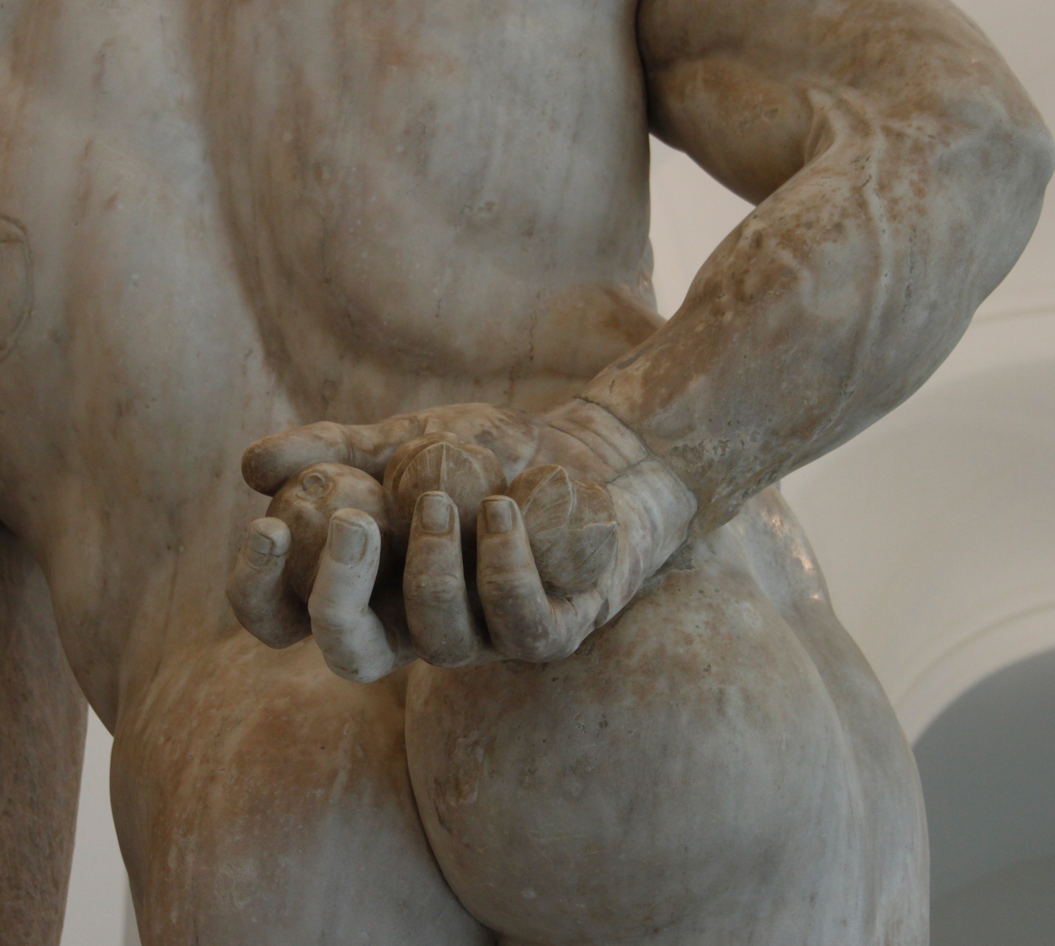 Particolare di Eracle Farnese (II secolo d.C., da originale di Lisippo del IV secolo a.C.), conservato al Museo archeologico nazionale di Napoli.